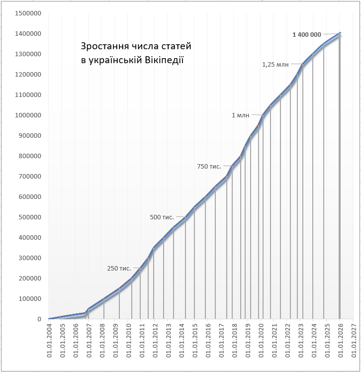 Число статей в українській Вікіпедії